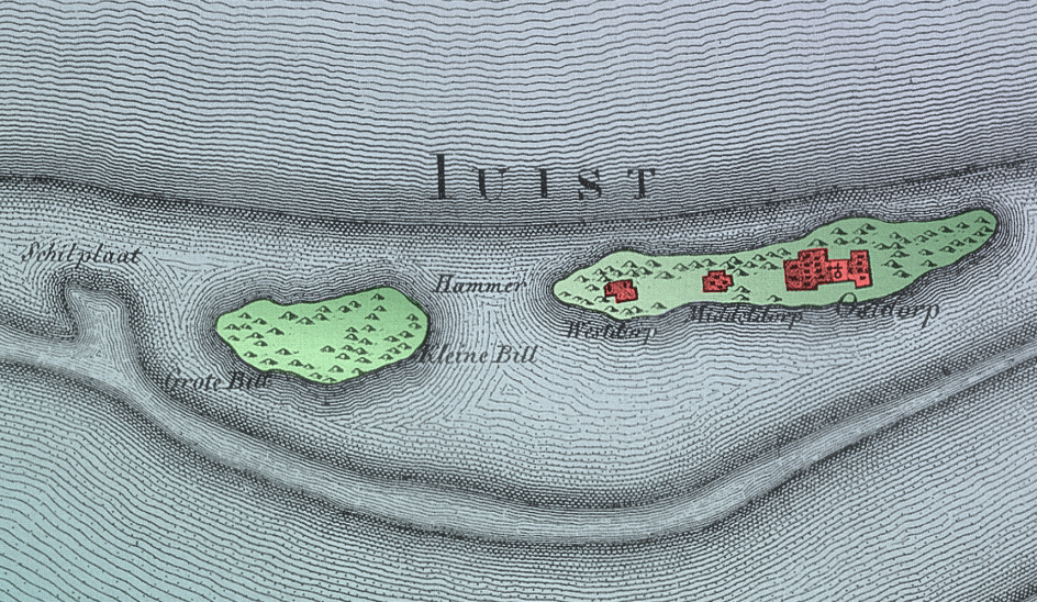 Zeichnung von Juist